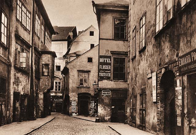 Maislova ulice (dnes Pařížská), pravo odbočující Kostečná ulice, v pohledu od Staroměstského náměstí směrem k Široké ulici (tehdy Josefské). Po pravé straně honosný renesanční dům Jakuba Baševiho